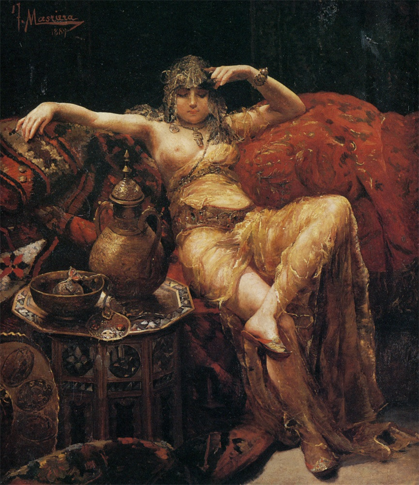 Harem Girl